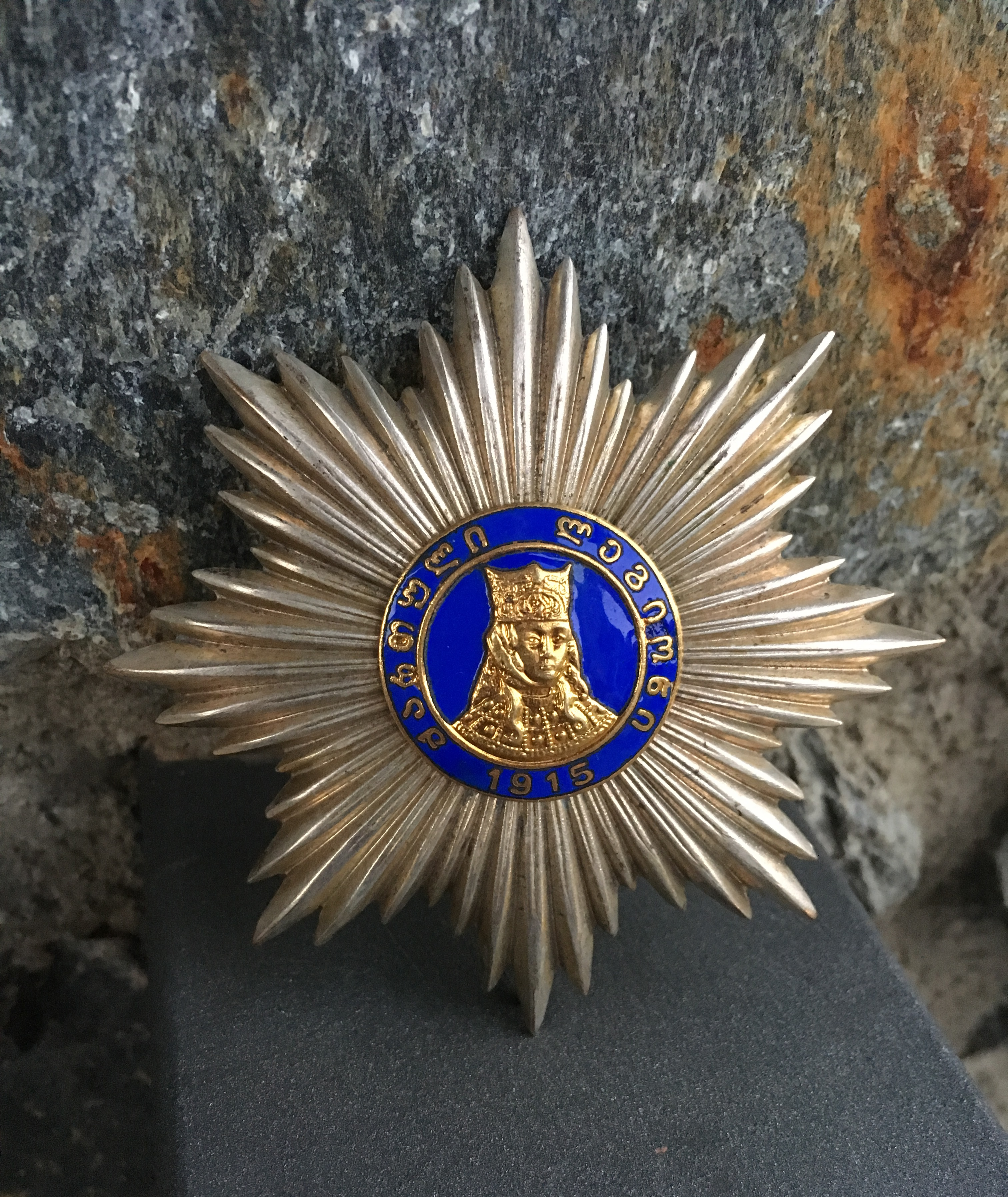 Placa de la Orden de la Santa Reina Tamara, Legión Georgiana. Parte de las AEA Collections.